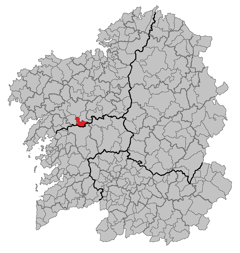 Mapa coa localización do concello de Vedra.